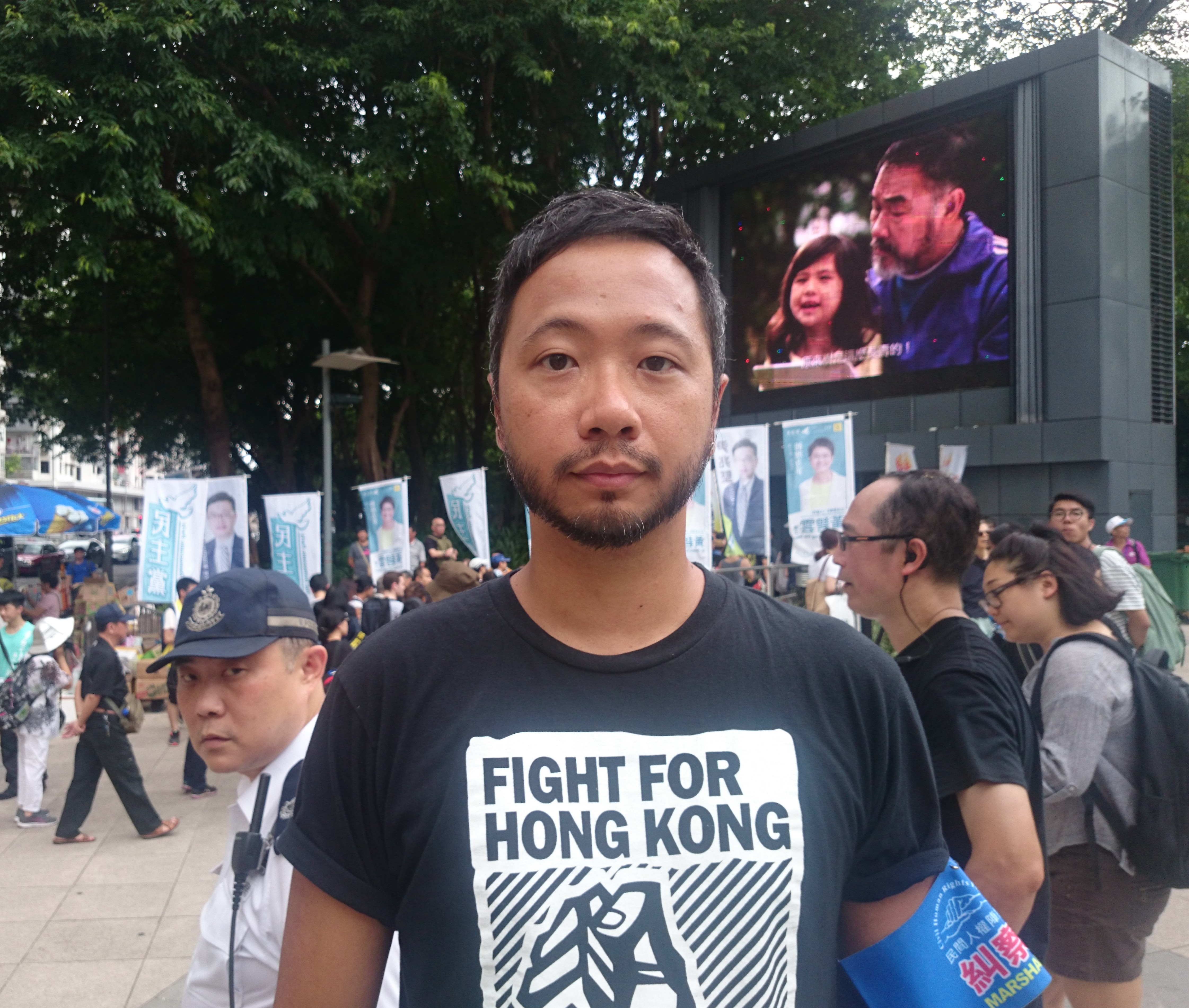 粵語: 曾健超企咗喺維多利亞公園度。